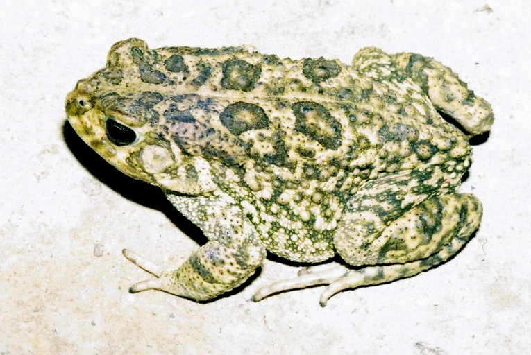 Bufo gutturalis